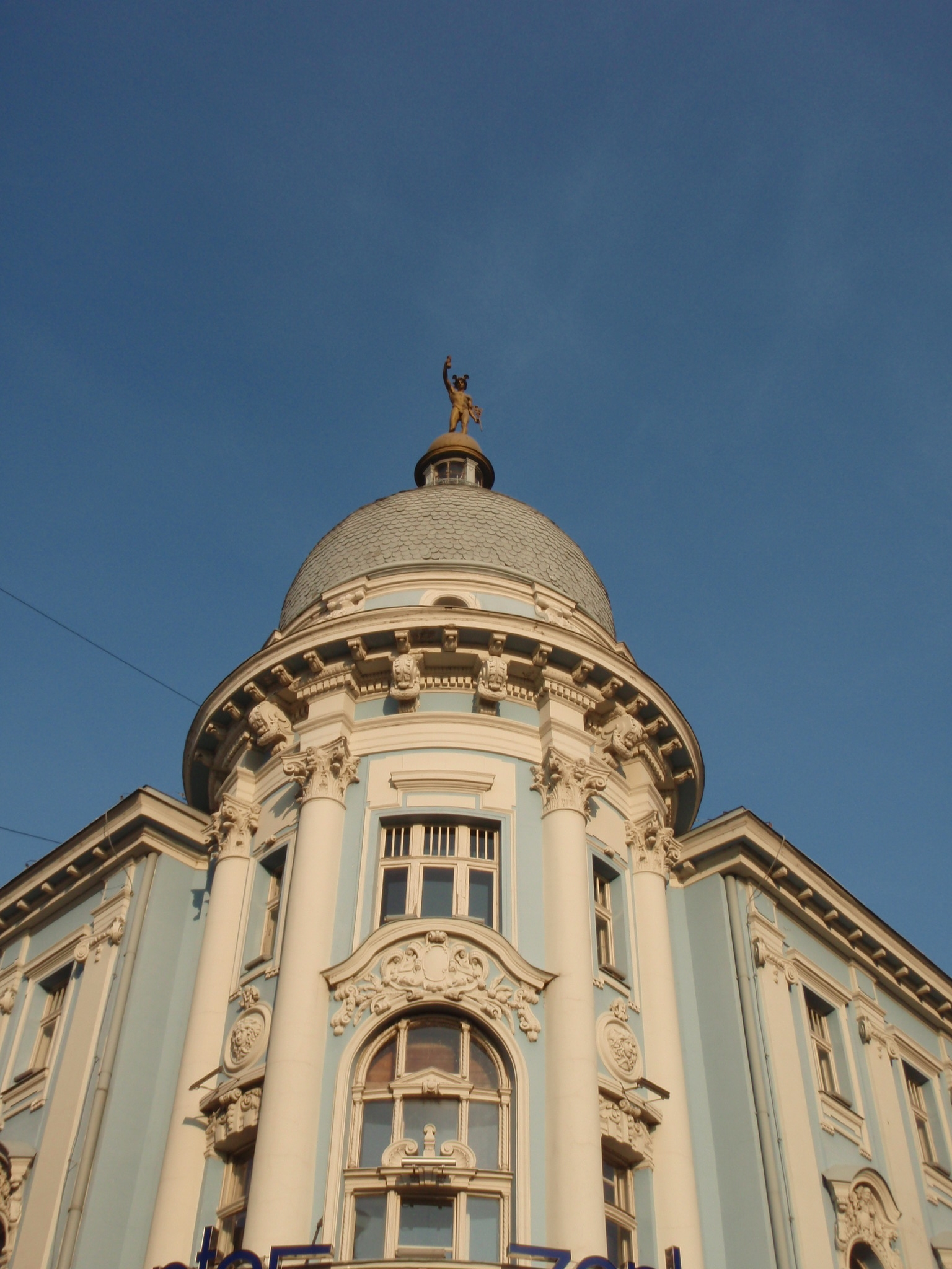 Na uglu Miletićeve i Grčkoškolske ulice i danas je jedna od najlepših građevina u Novom Sadu, nekada zgrada Centralnog kreditnog zavoda čiji je jedan od glavnih osnivača bio čuveni Lazar Dunđerski.